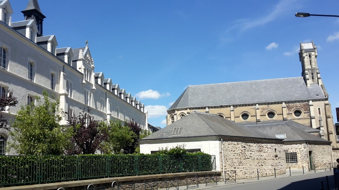 Façades Est et Chapelle